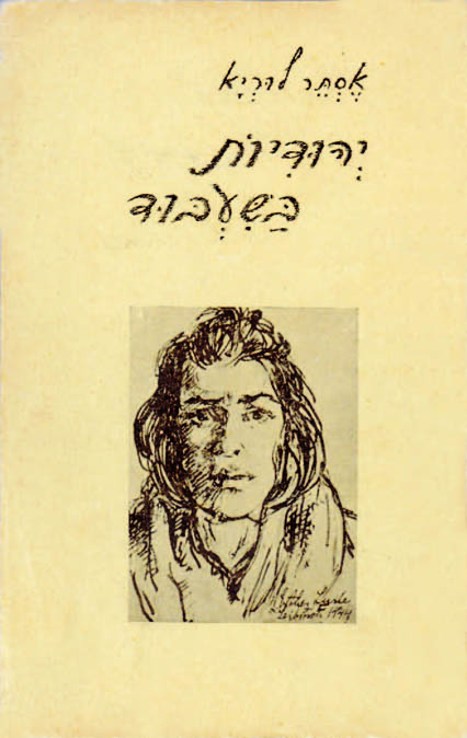 אסתר לוריא הייתה ציירת עטורת פרסים ומעצבת במה ותפאורה. זכתה פעמיים בפרס דיזנגוף. הספרון "יהודיות בשעבוד", בו כלל רישומים של לוריא שפורסם לאחר מלחמת העולם השנייה במסגרת "מועדון החייל העברי" ברומא